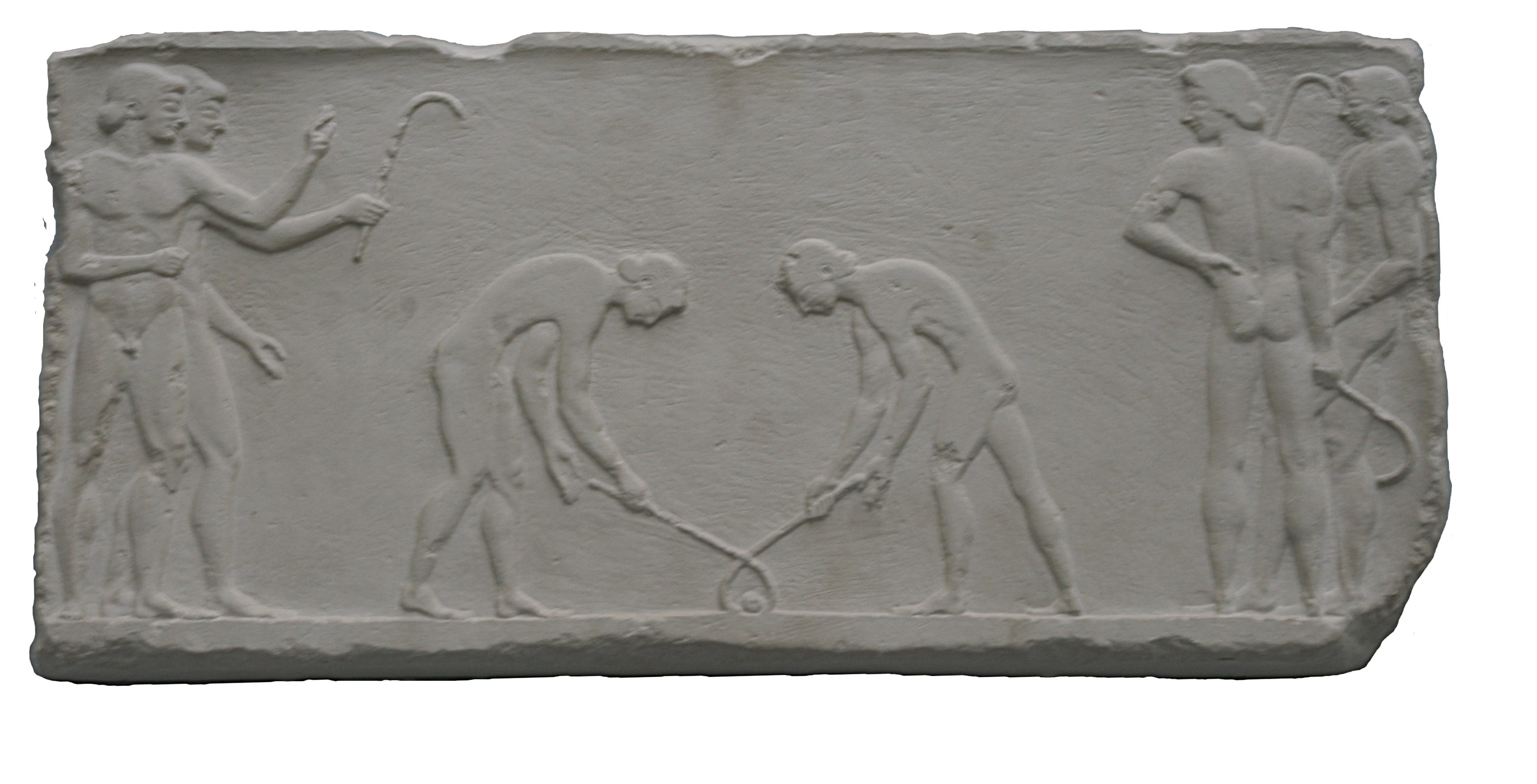 Abguss eines Reliefs eines Ballspiels, dessen Regeln leider nicht überliefert sind. Original Athen, Nationalmuseum. ca. 500 v.Chr. Photographed by me in Glytothek Munich